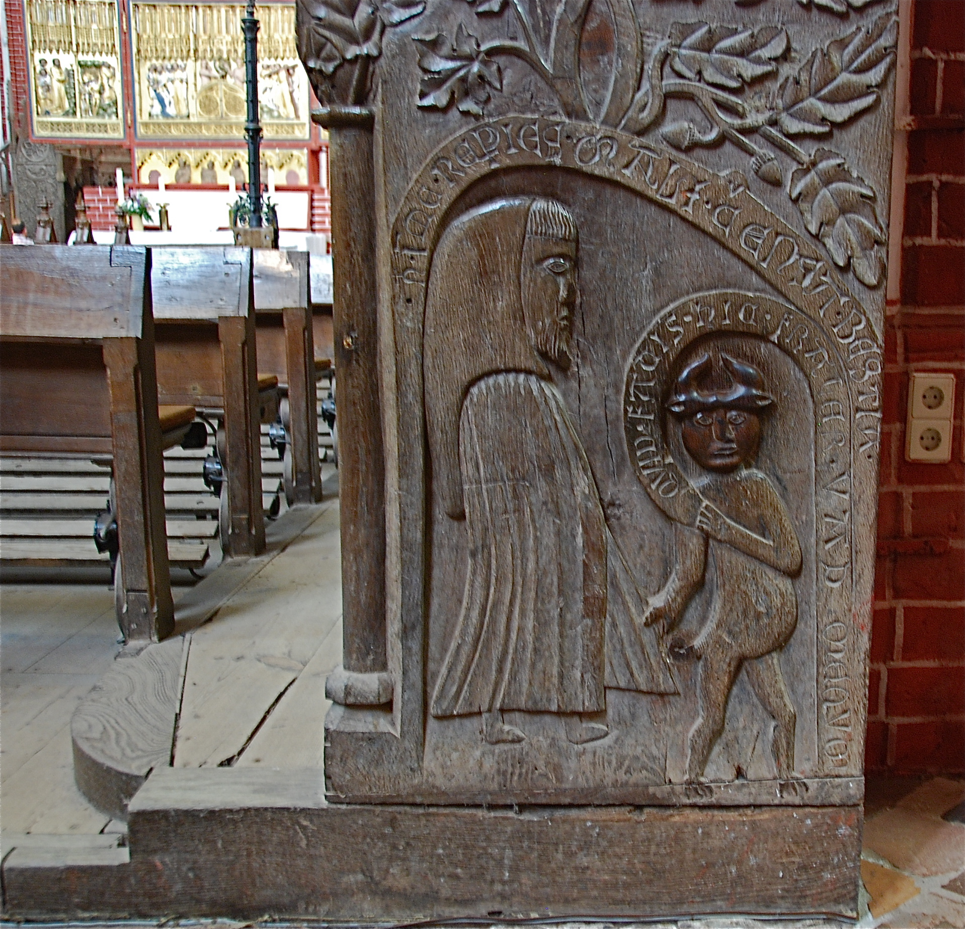 Bad Doberan minster choir stalls